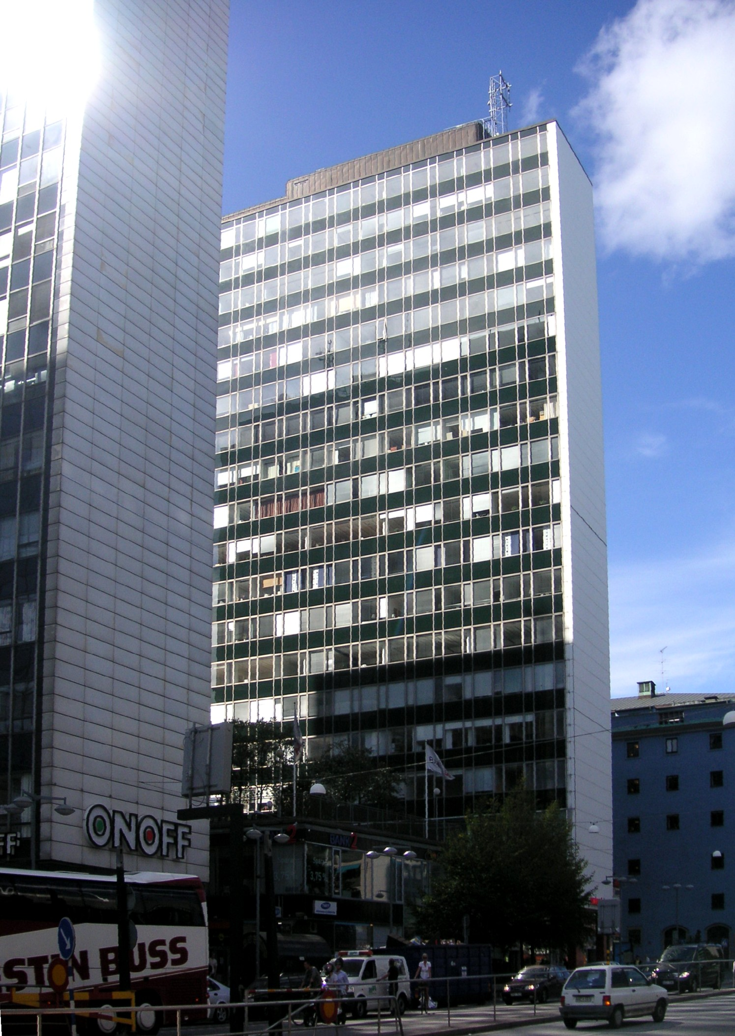 City höghus nr 1 i Stockholm av Helldén